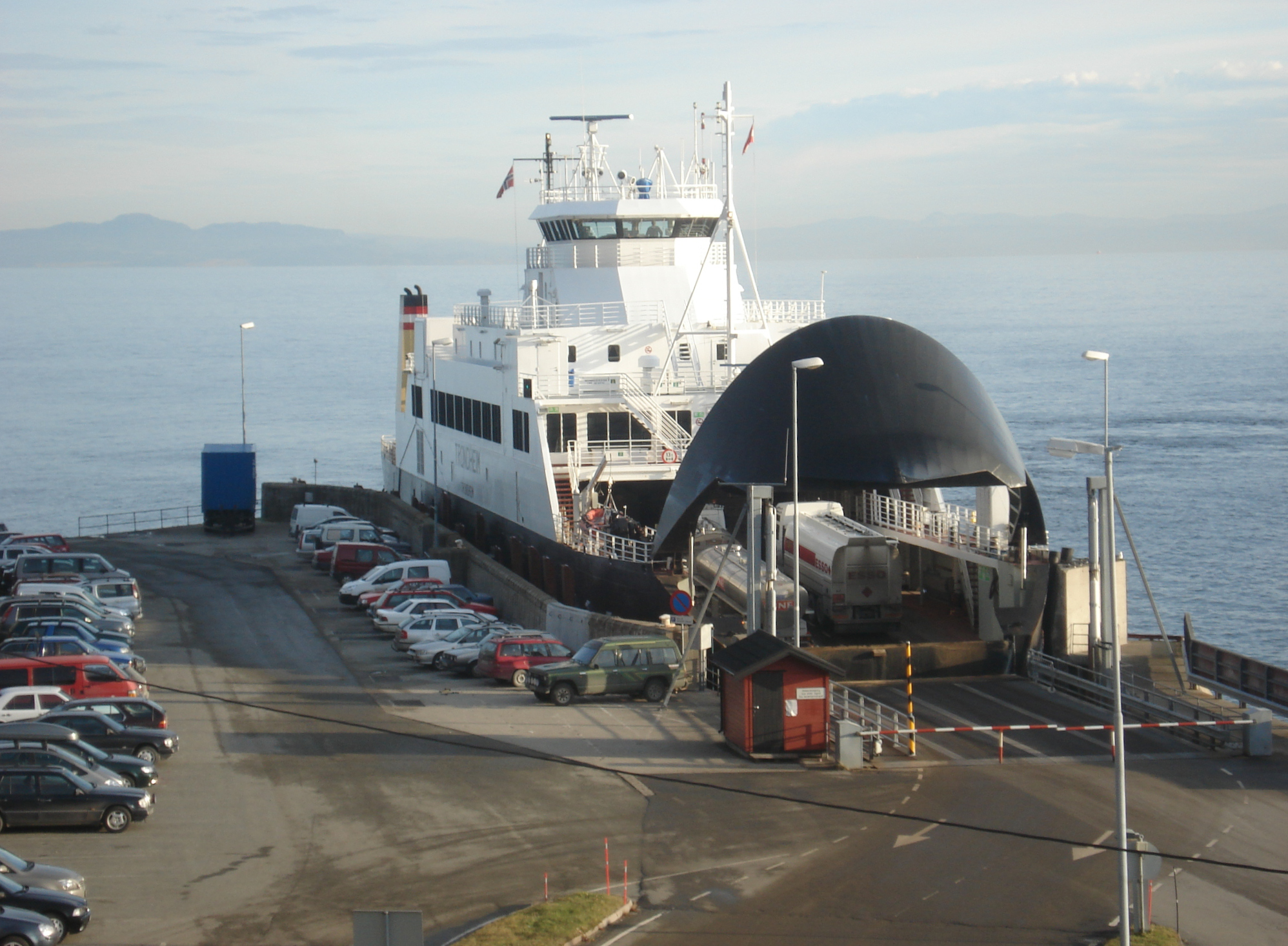 MF Trondheim ved ferjeleie på Rørvik, ved Riksveg 715. Byneset t.v. på andre sida Trondheimsfjorden.